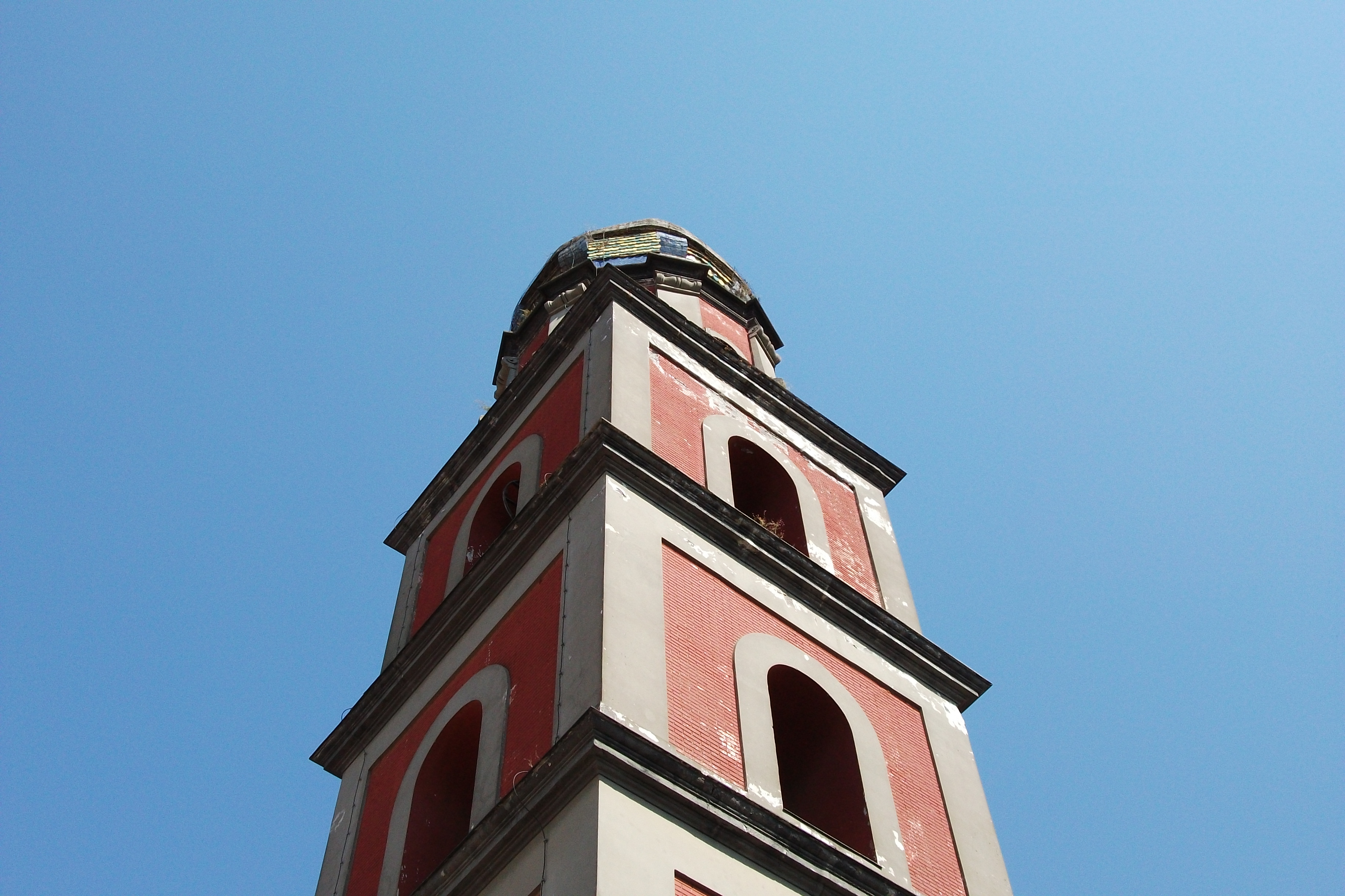 Piazza raffaele Cimmino